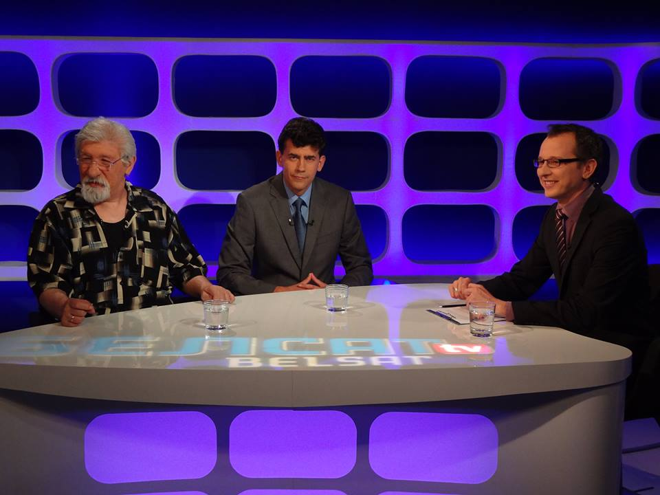 Siarhiej Padsasonny - mieszkający w Polsce białoruski dziennikarz, działacz na rzecz LGBT i filolog, redaktor główny bloku informacyjnego telewizji Biełsat TV.